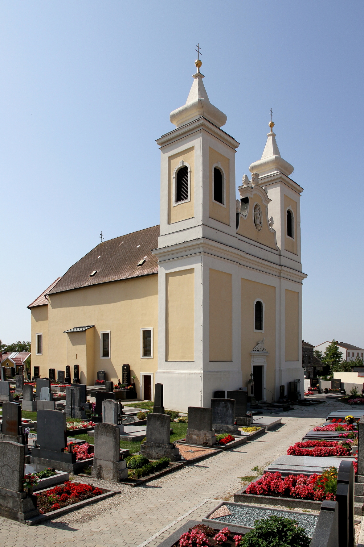 Die kath. Pfarrkirche hl. Florian in der burgenländischen Gemeinde Winden am See.